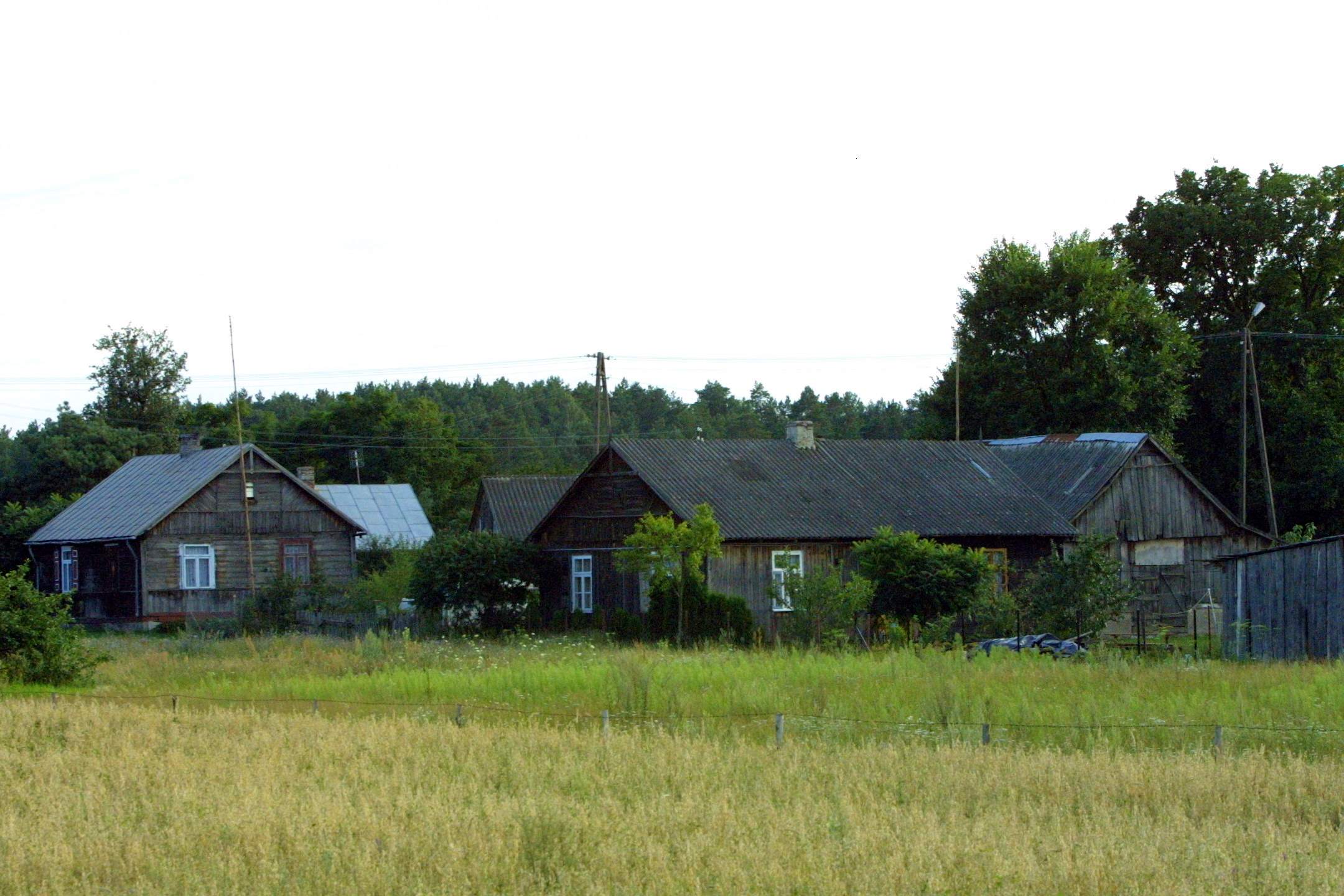 Poniatowo